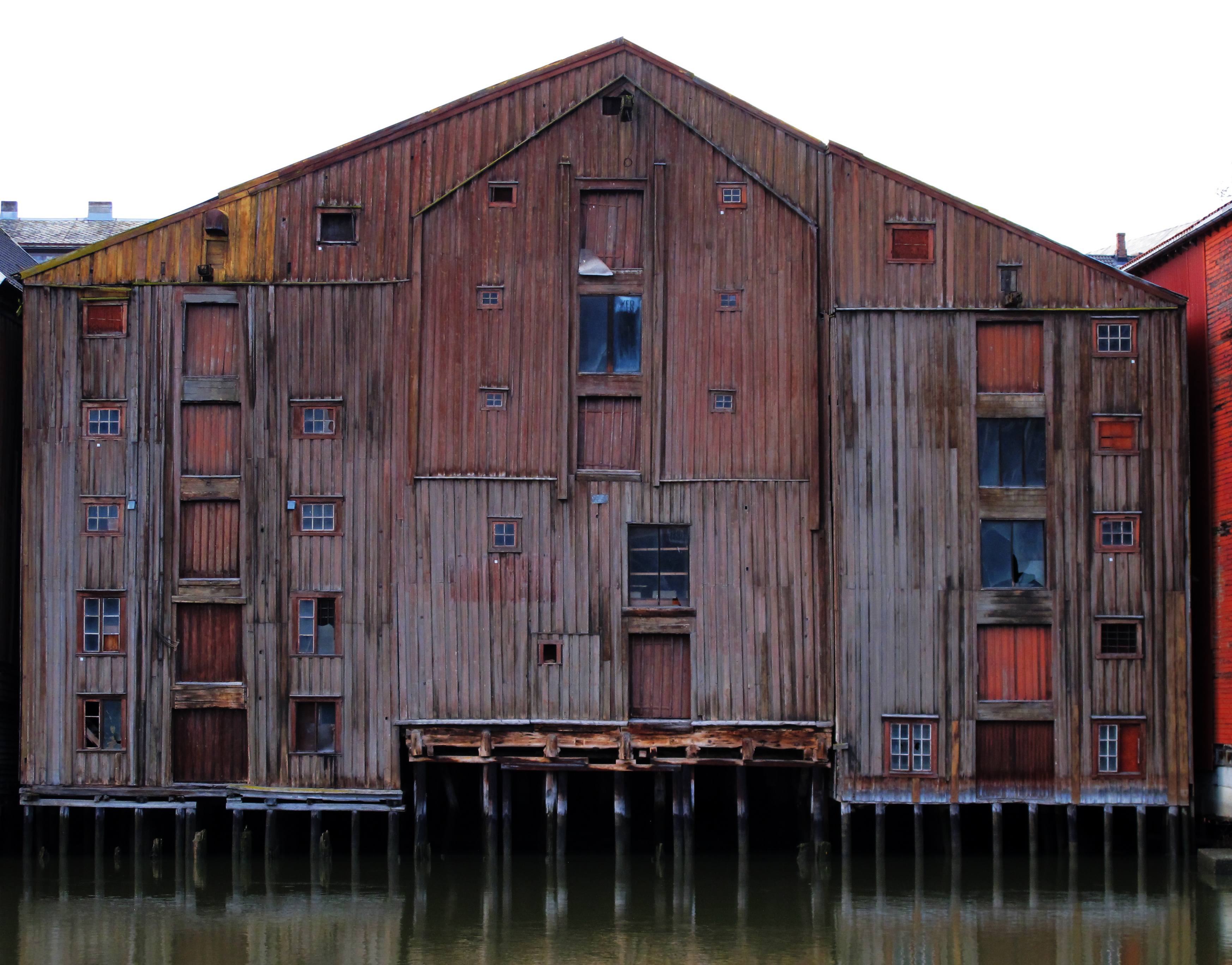 Brygge ved Nidelva, Indre havn, Kjøpmannsgata i Trondheim